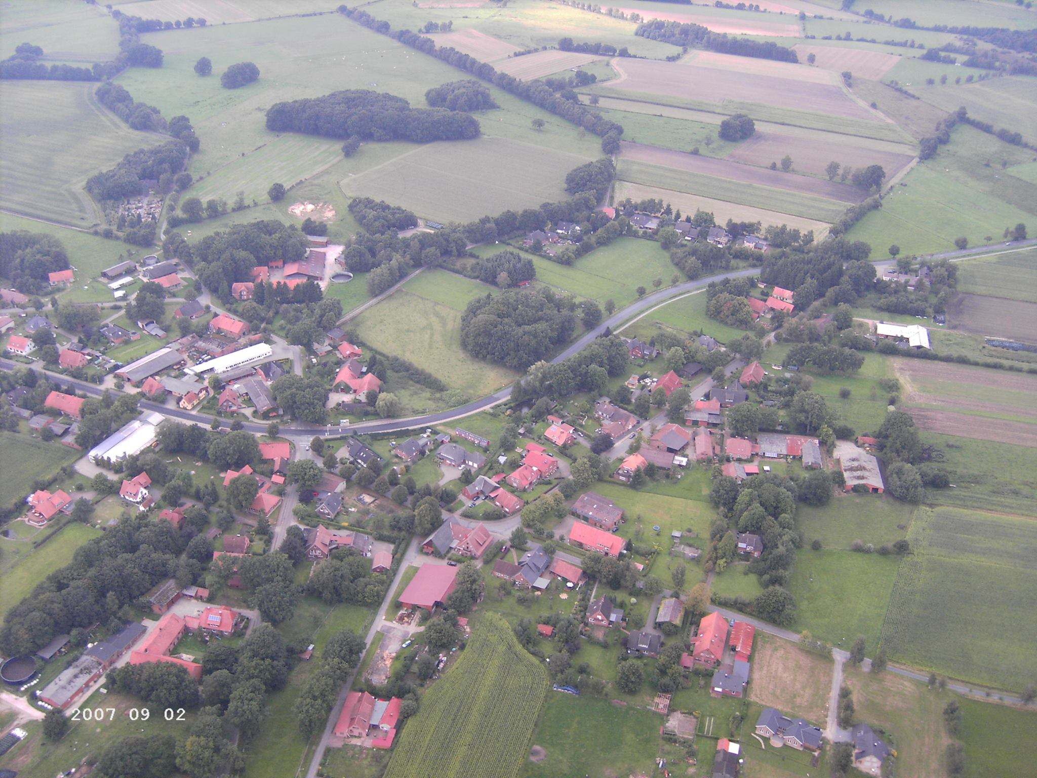 Luftbild Ostertimke